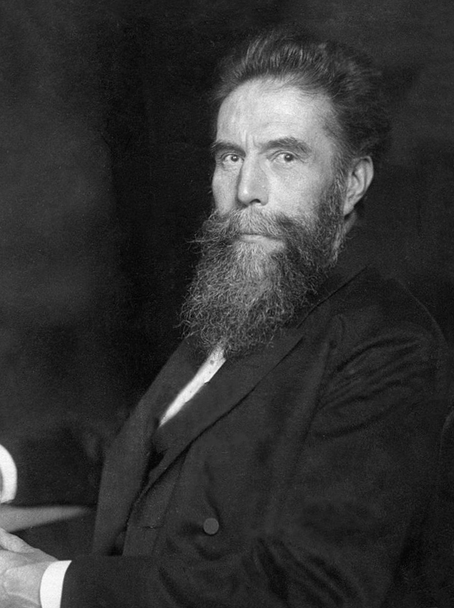 Wilhelm Conrad Röntgen